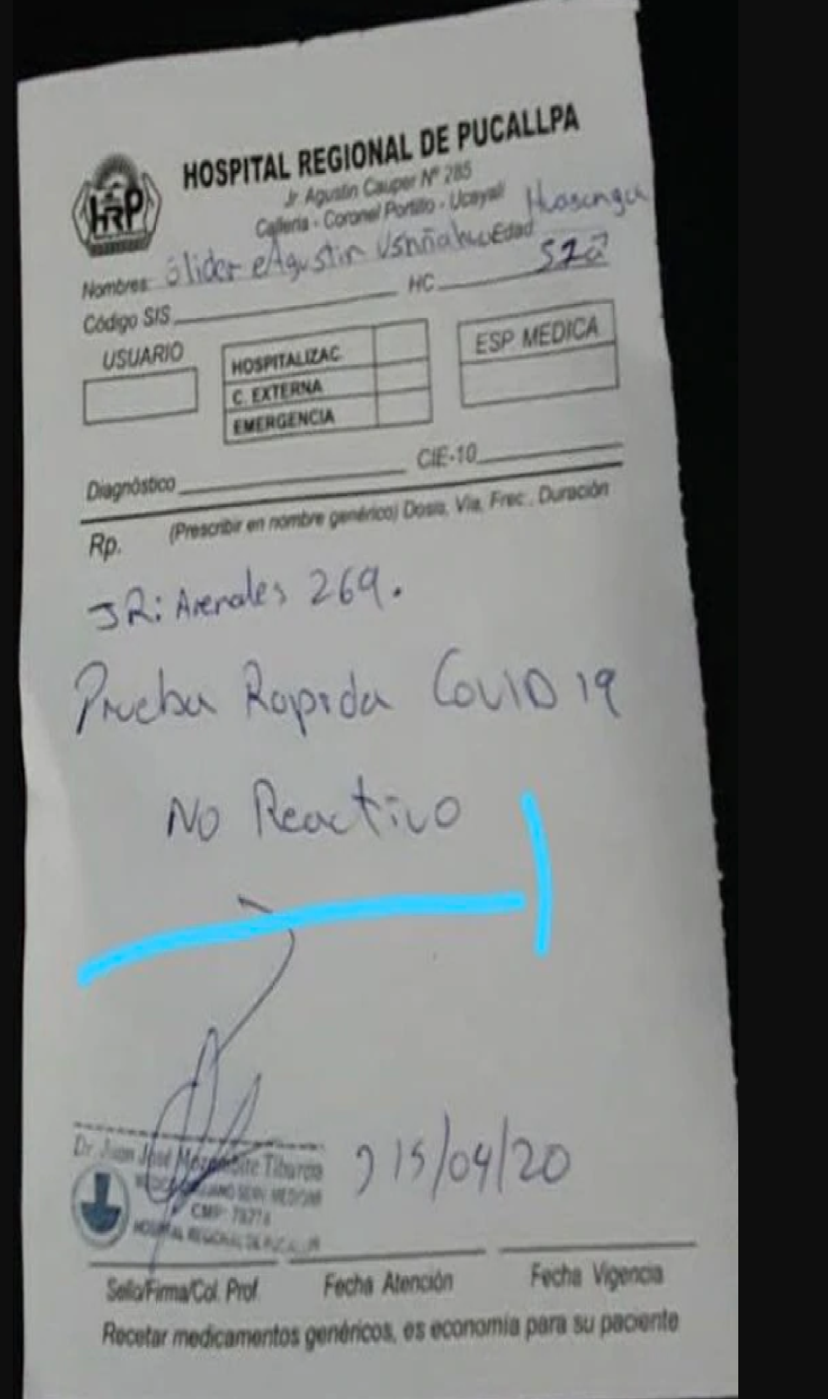 Glider Ushñahua Huasanga, recibo de su prueba rápida para COVID-19